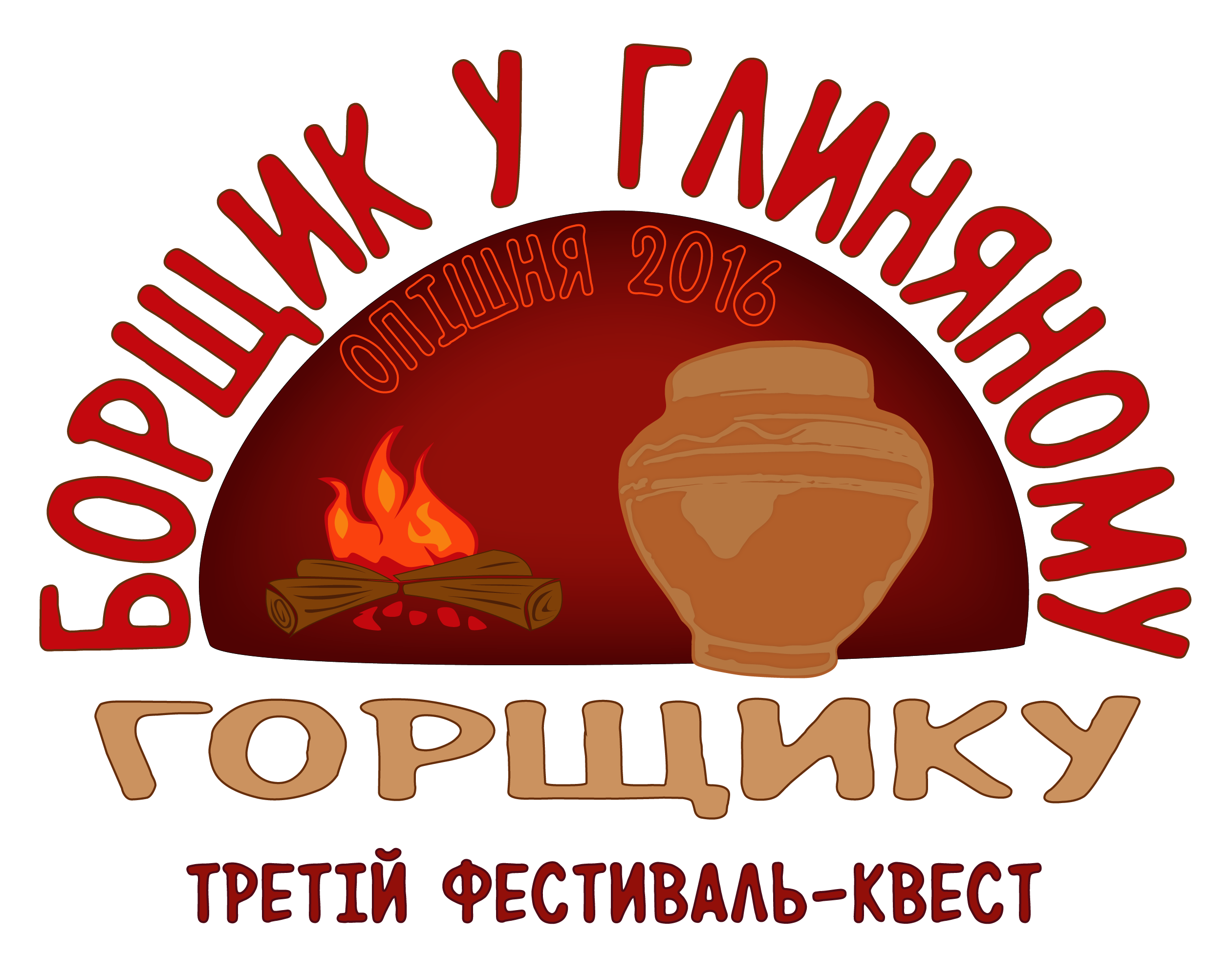 логотип